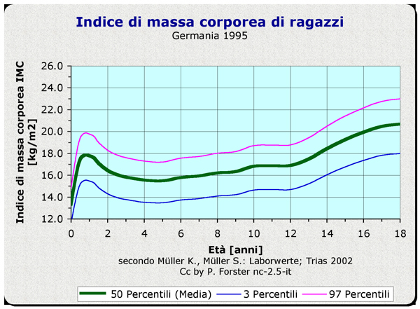 Grafica: Medicina: Peso corporeo: Indice di massa corporea di ragazzi : IMC, BMI, età